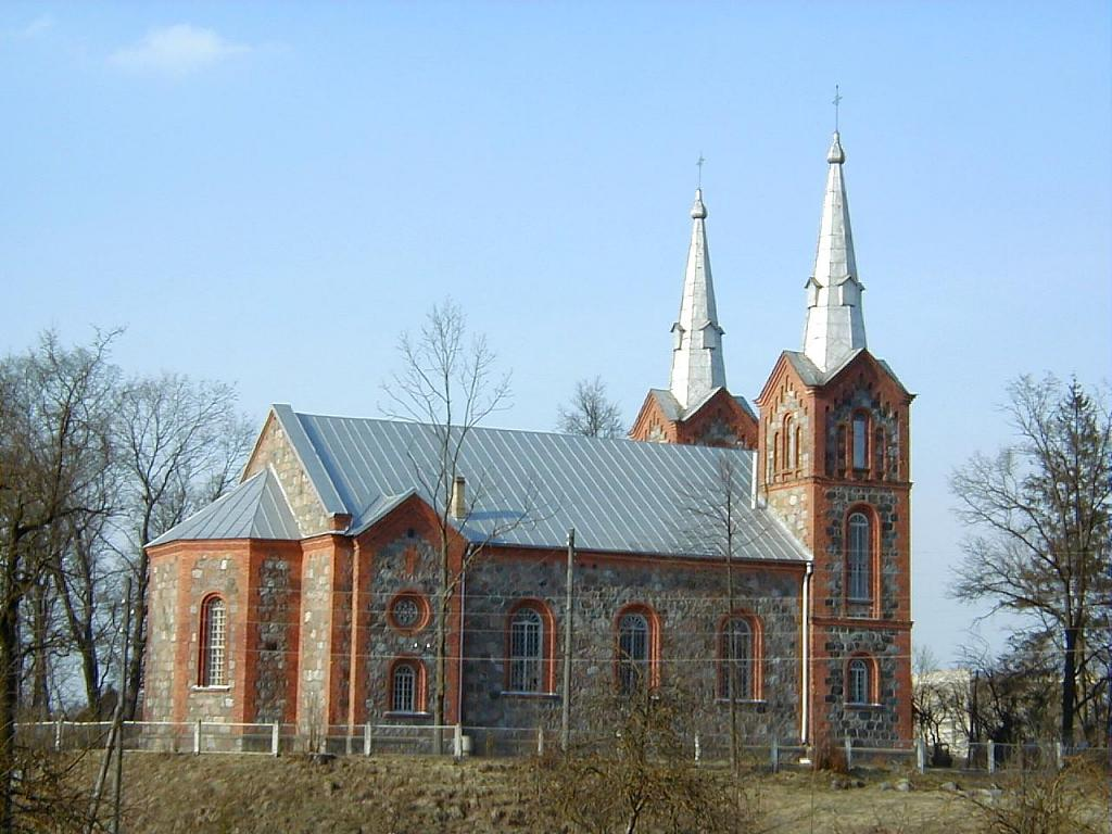 Riebiņu baznīca 2001-04-08